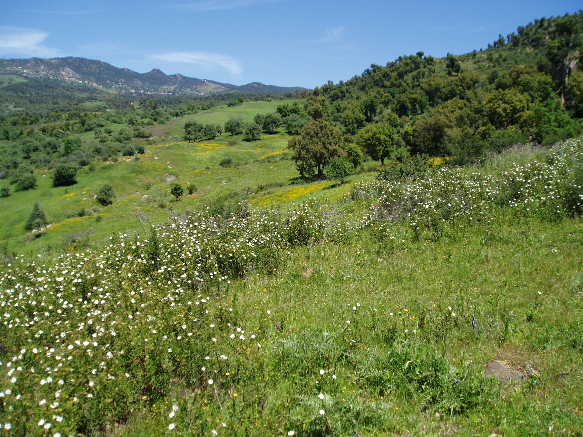 Paysage près d'Azazga , Tizi-Ouzou, Algeria.